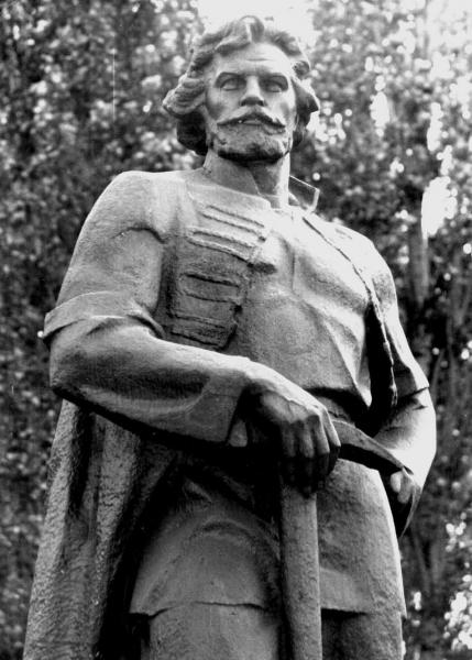 памятник на шахтах в Лисичанске